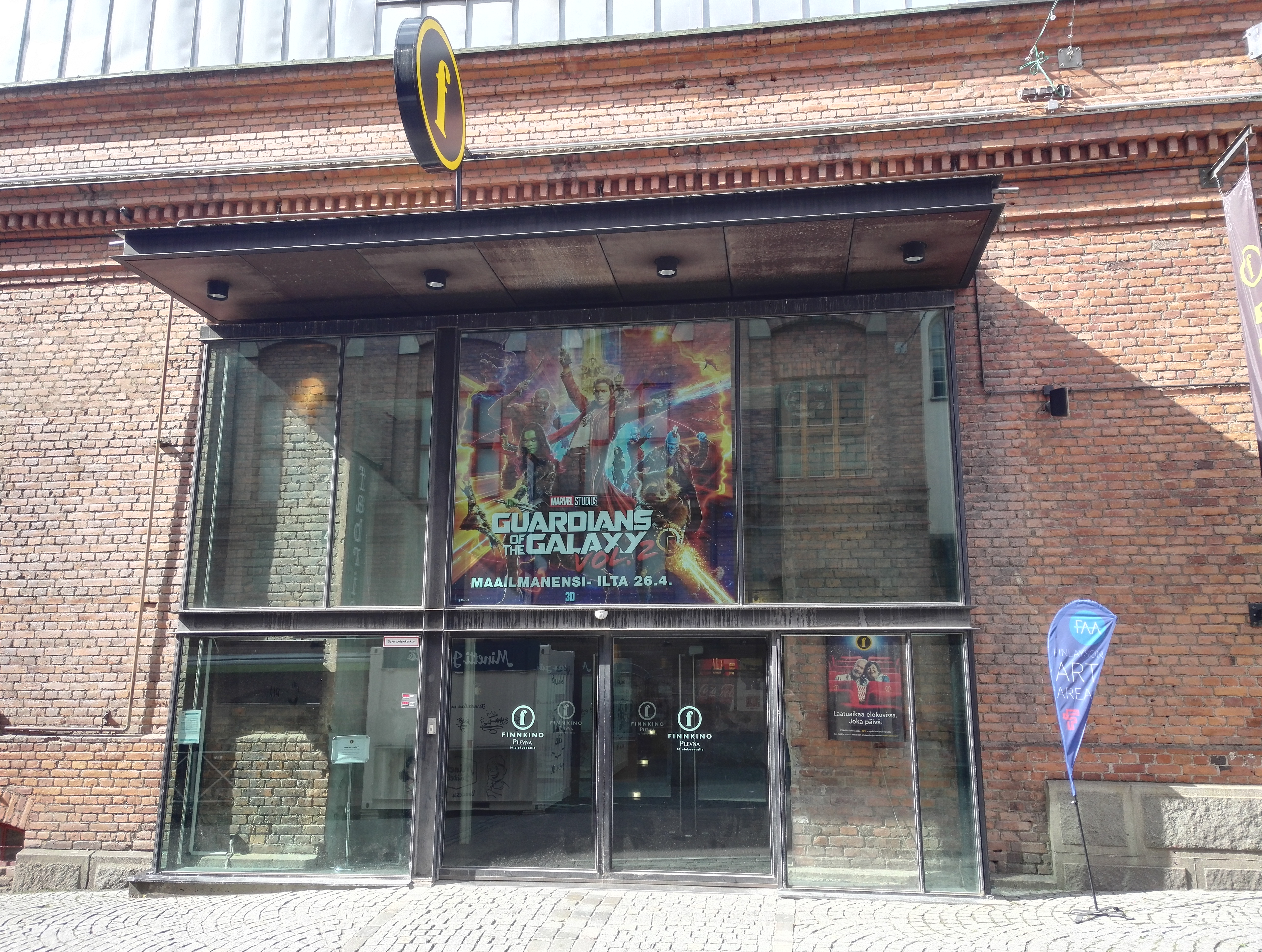 Plevna-elokuvateatterin sisäänkäynti